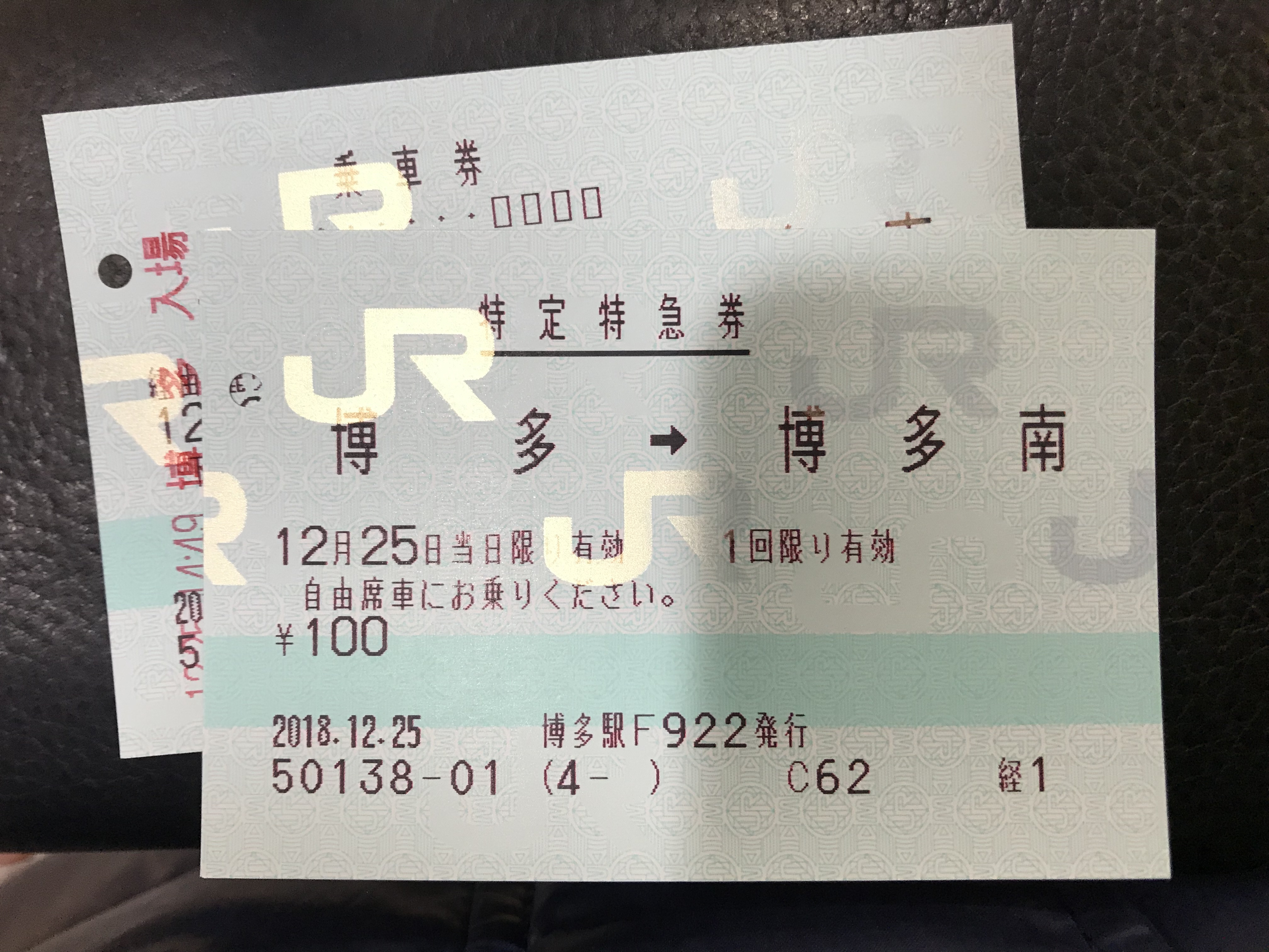 博多駅発行の博多南までの乗車券と特急券